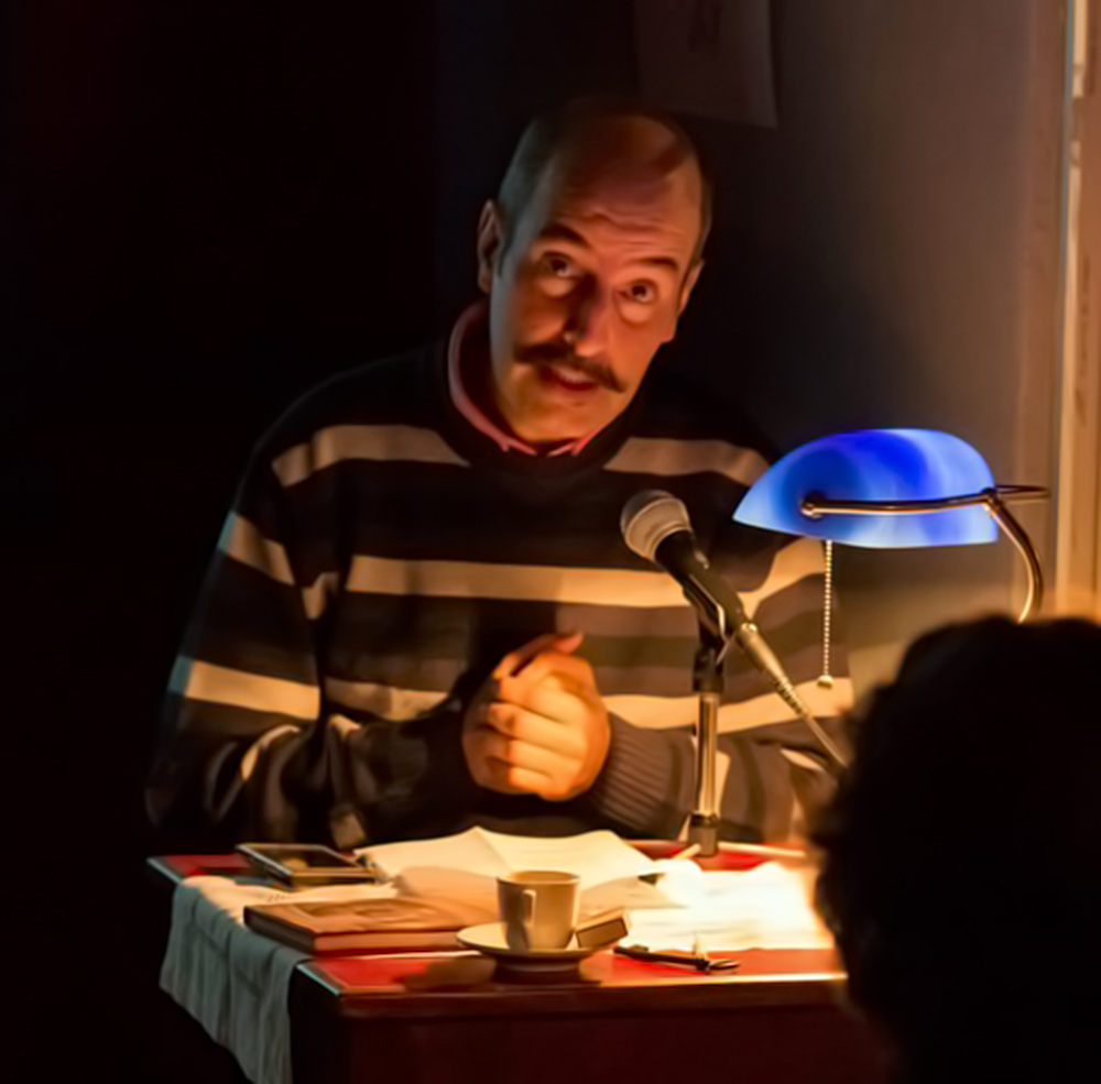 Pablo Silva Olazabal leyendo un trabajo de su autoría